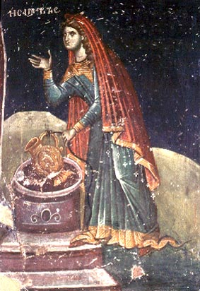 фреска "Самарянка" (из композиции Христос и Самарянка) из церкви святого Николая Орфаноса (Салоники)